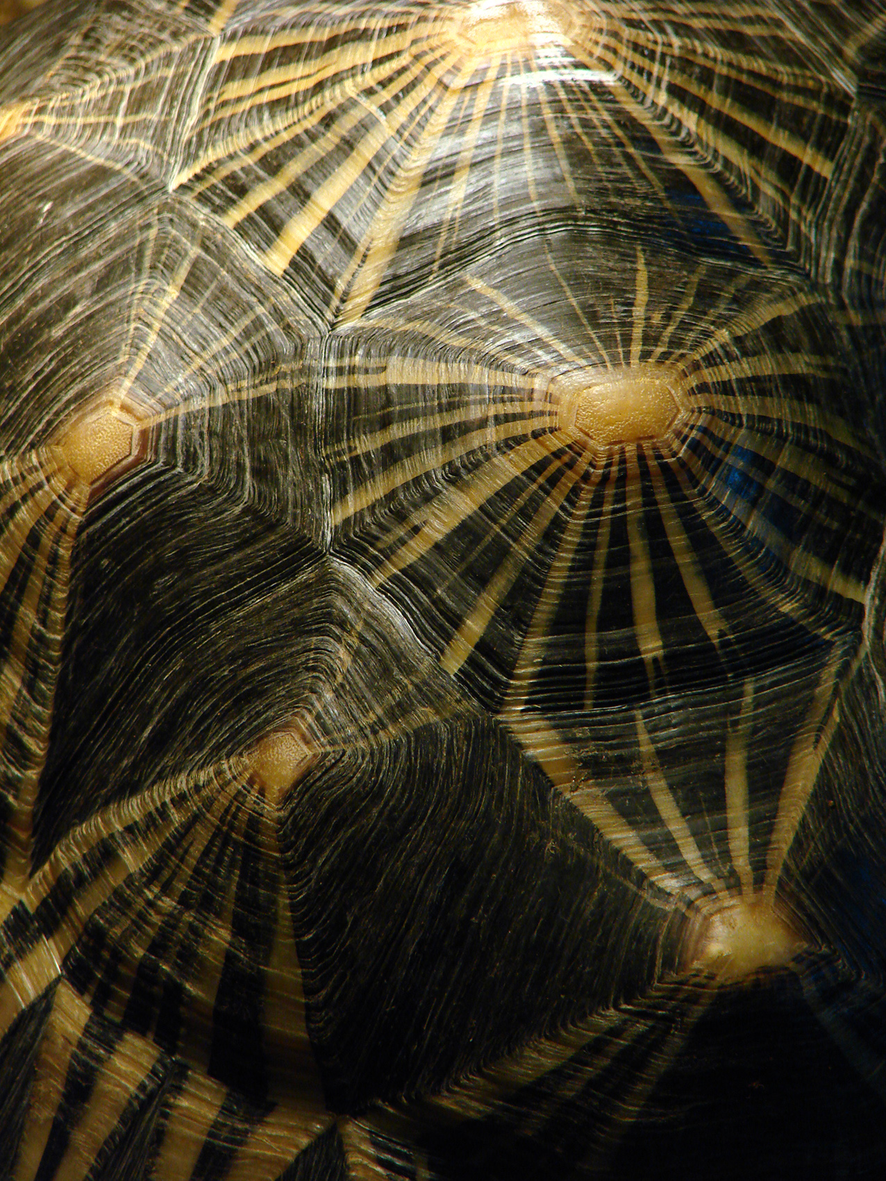 Tortue rayonnée ( Astrochelys radiata, habitat Sud de Madagascar). L'Ile aux Serpents, à La Trimouille (86).